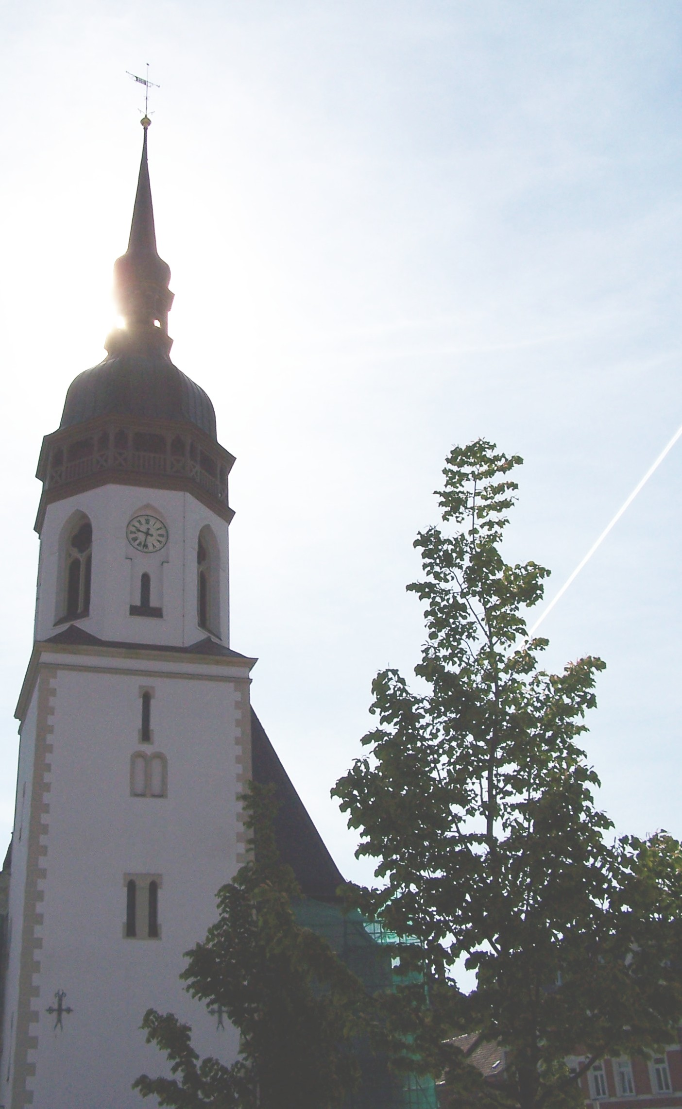 St. Laurentius, Stadtkirche von Markranstädt, Aufnahme aus dem Jahre 2005